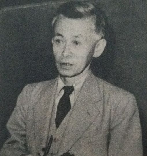 末弘厳太郎の生前最後の写真